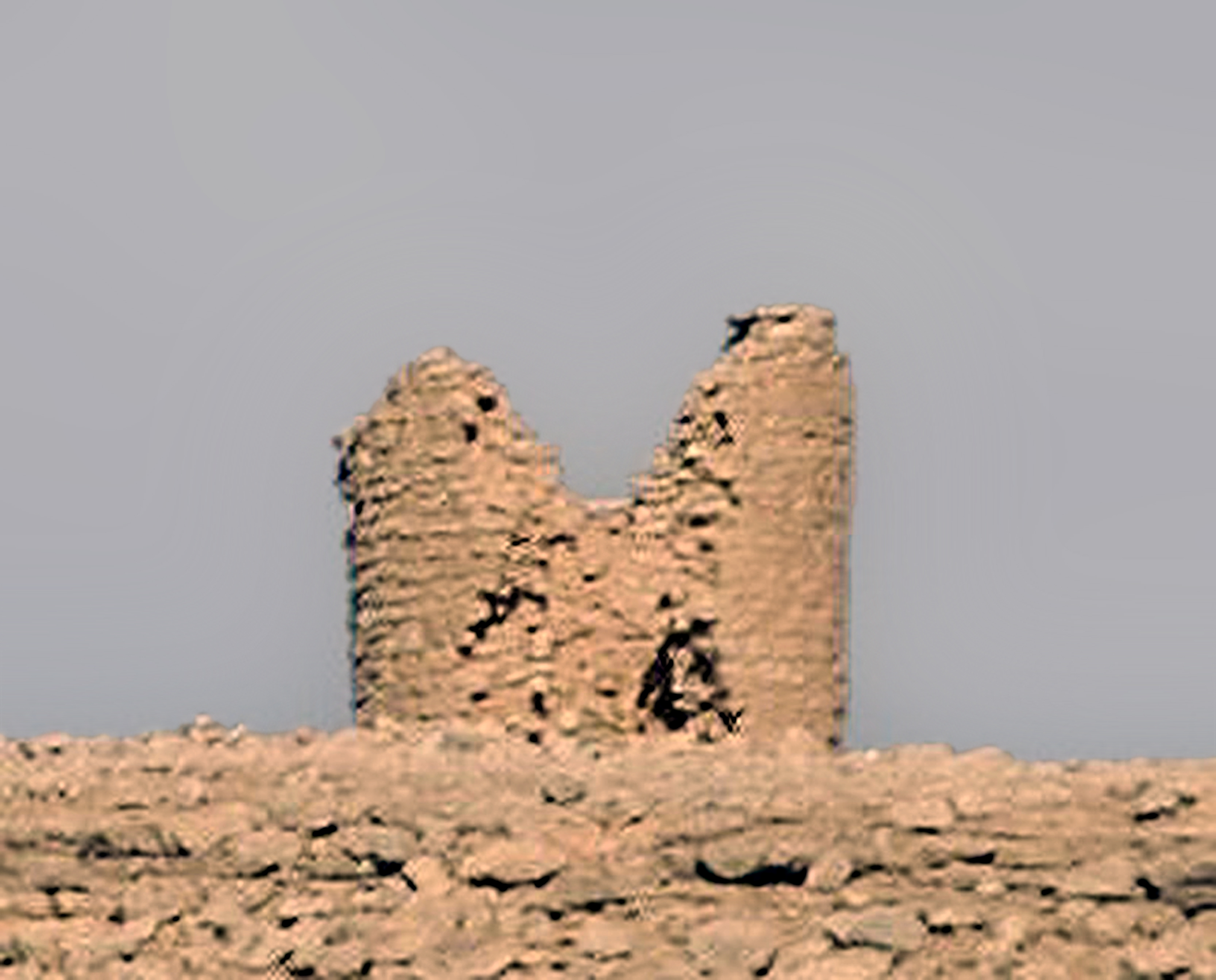 Kastell Gheriat el-Garbia - Burgus des Severus Alexander (2006)